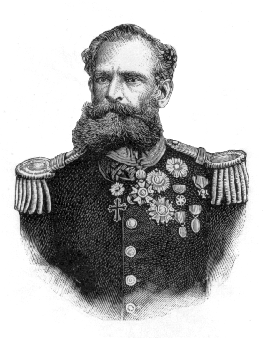 Marechal Manuel Deodoro da Fonseca, primeiro presidente do Brasil.